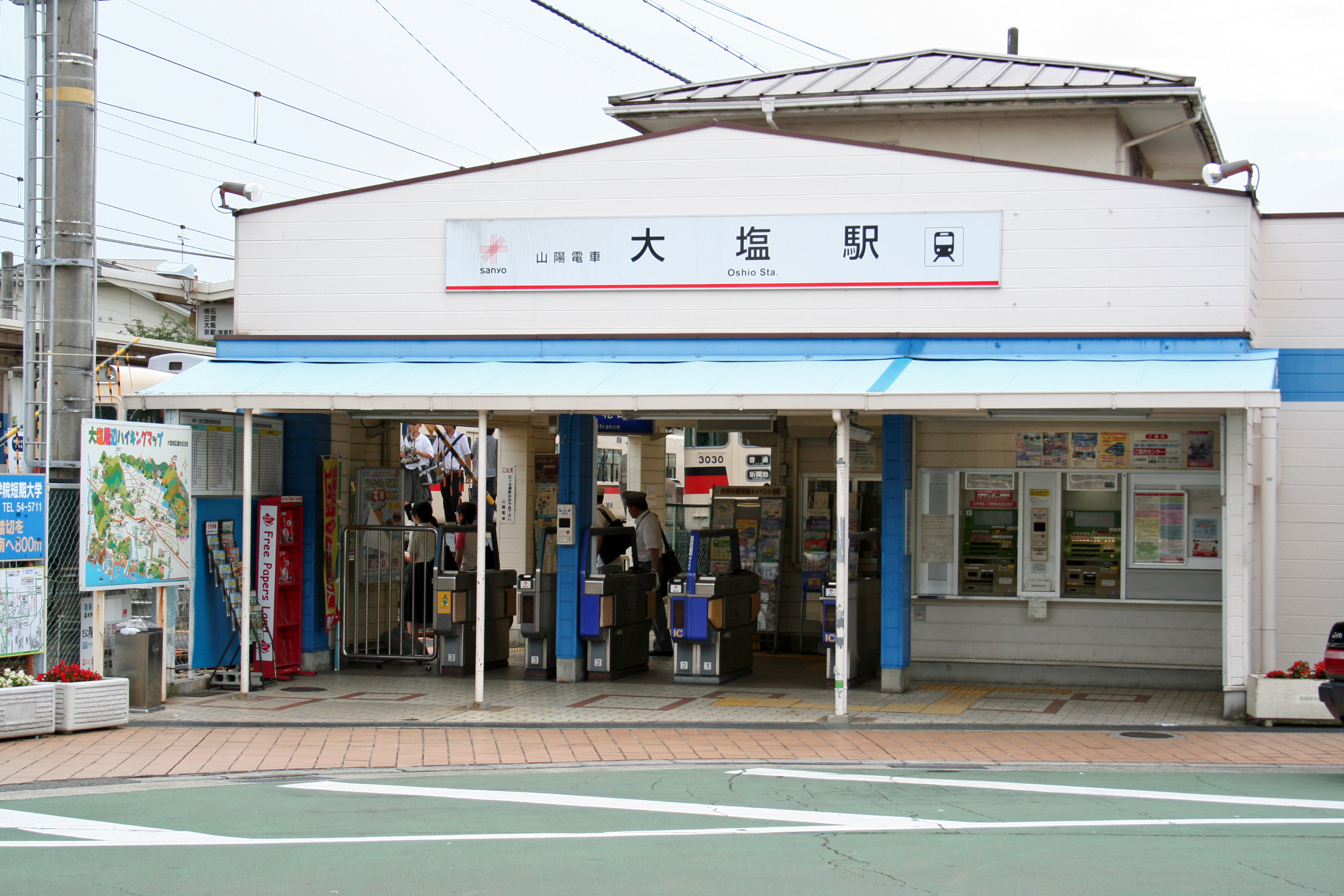 姫路市にある大塩駅の駅舎。